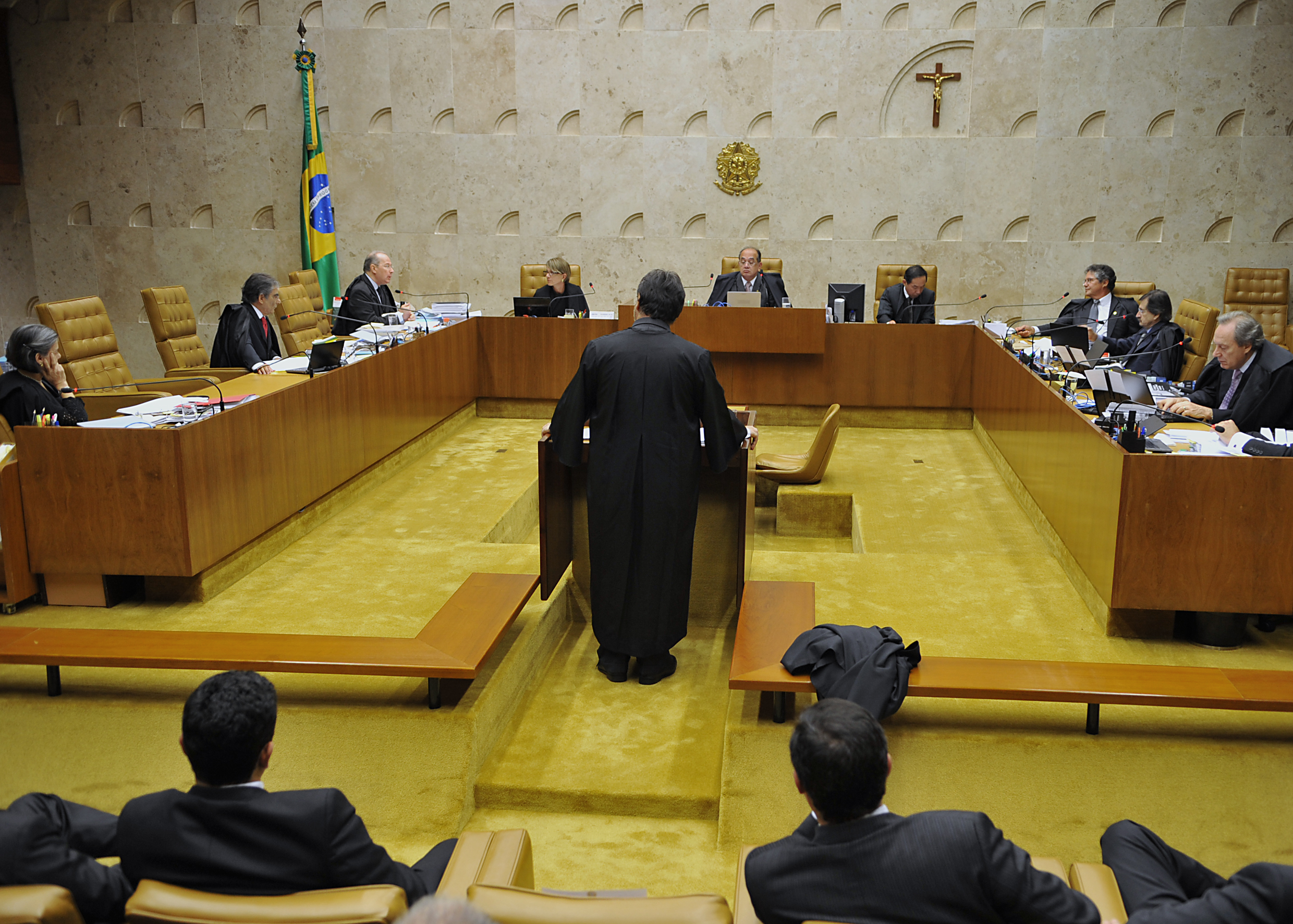 Brasília - Ministros do Supremo avaliam pedido de habeas corpus do governador afastado do Distrito Federal, José Roberto Arruda